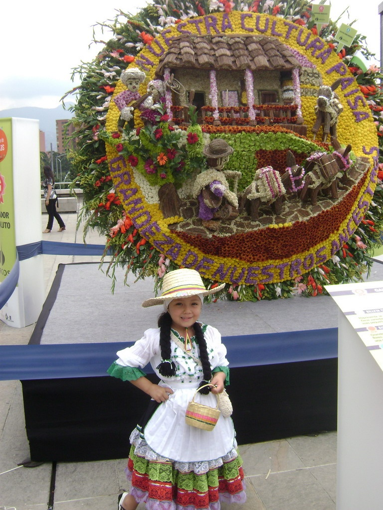 Niña Silletera, foto tomada en la exposición de las silletas en la Plaza Mayor de Medellin Antioquia Colombia